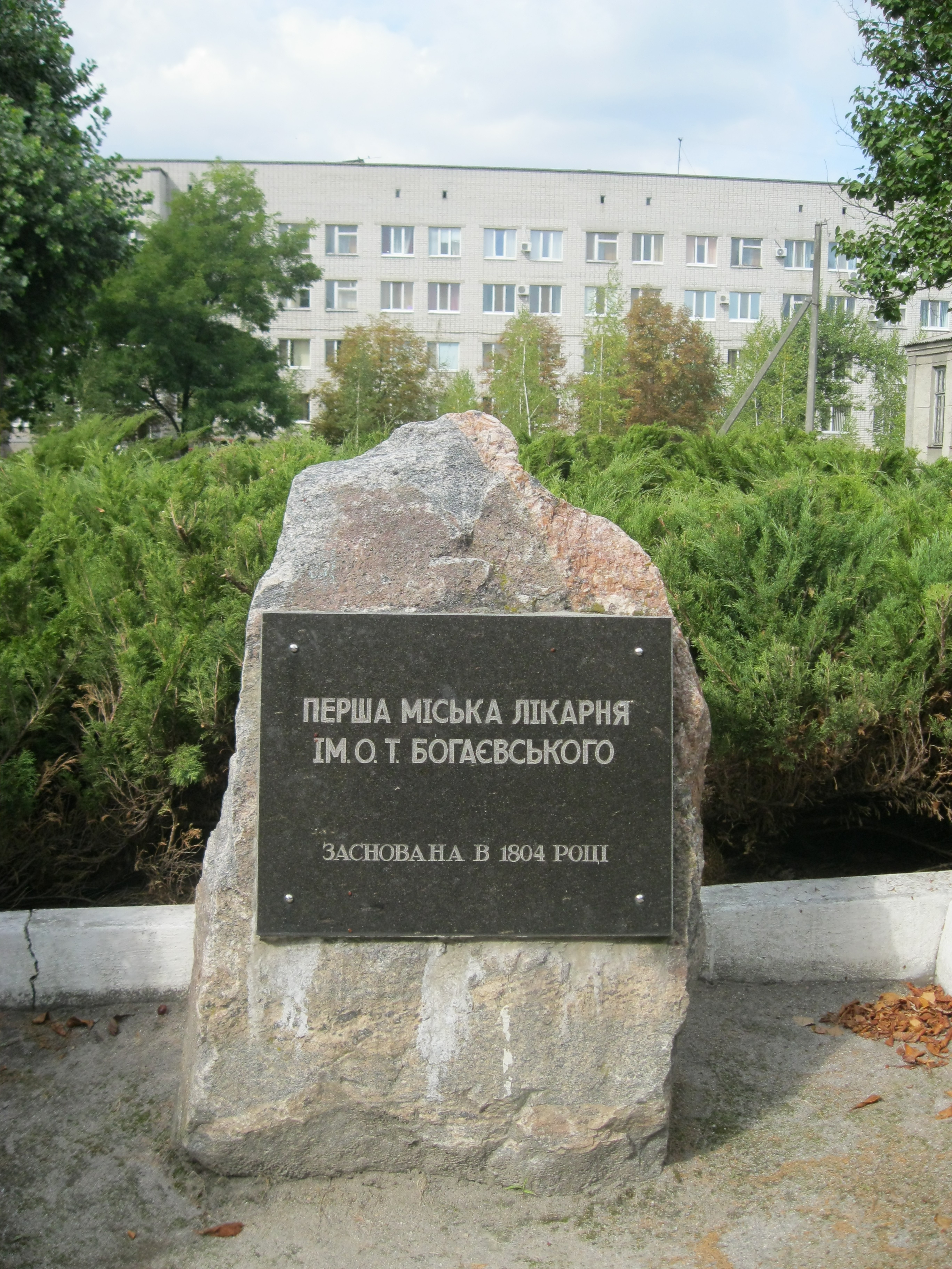 Пам’ятний знак на честь лікаря О. Т. Богаєвського., Кременчук, Вул. Лікаря О. Богаєвського, територія 1-ї міської лікарні. Наразі табличку змінено. Раніше на знаку був надпис (російською): «Богаевский Авксентий Трофимович. 1848-1930 гг. Первый главный врач больницы, доктор медицины».